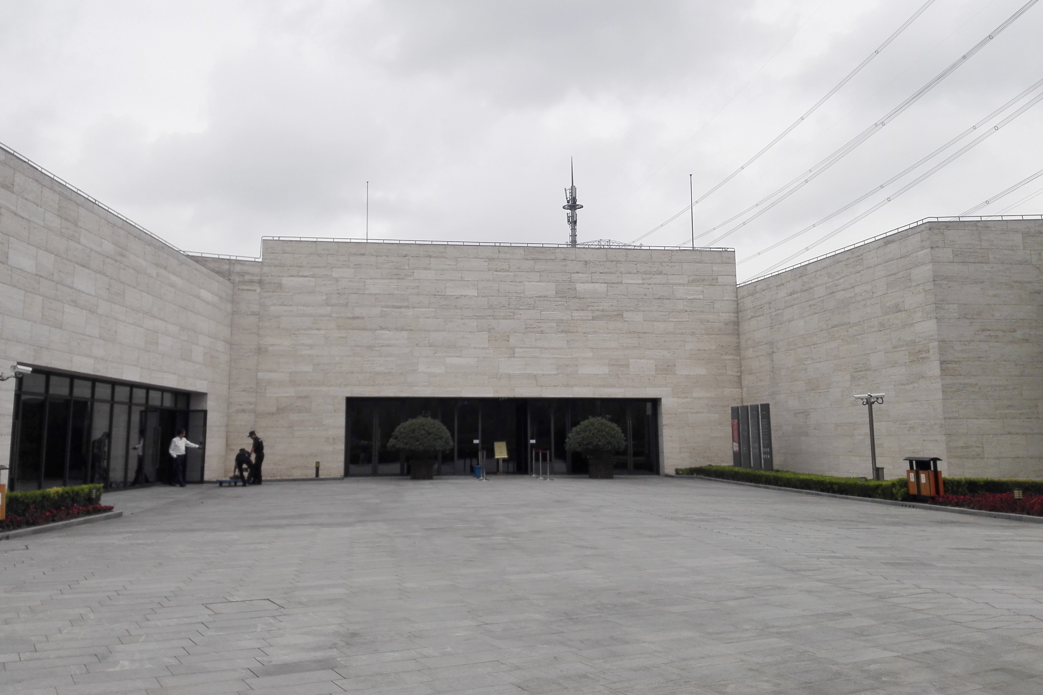 中文（中国大陆）: 上海青浦 崧泽遗址博物馆